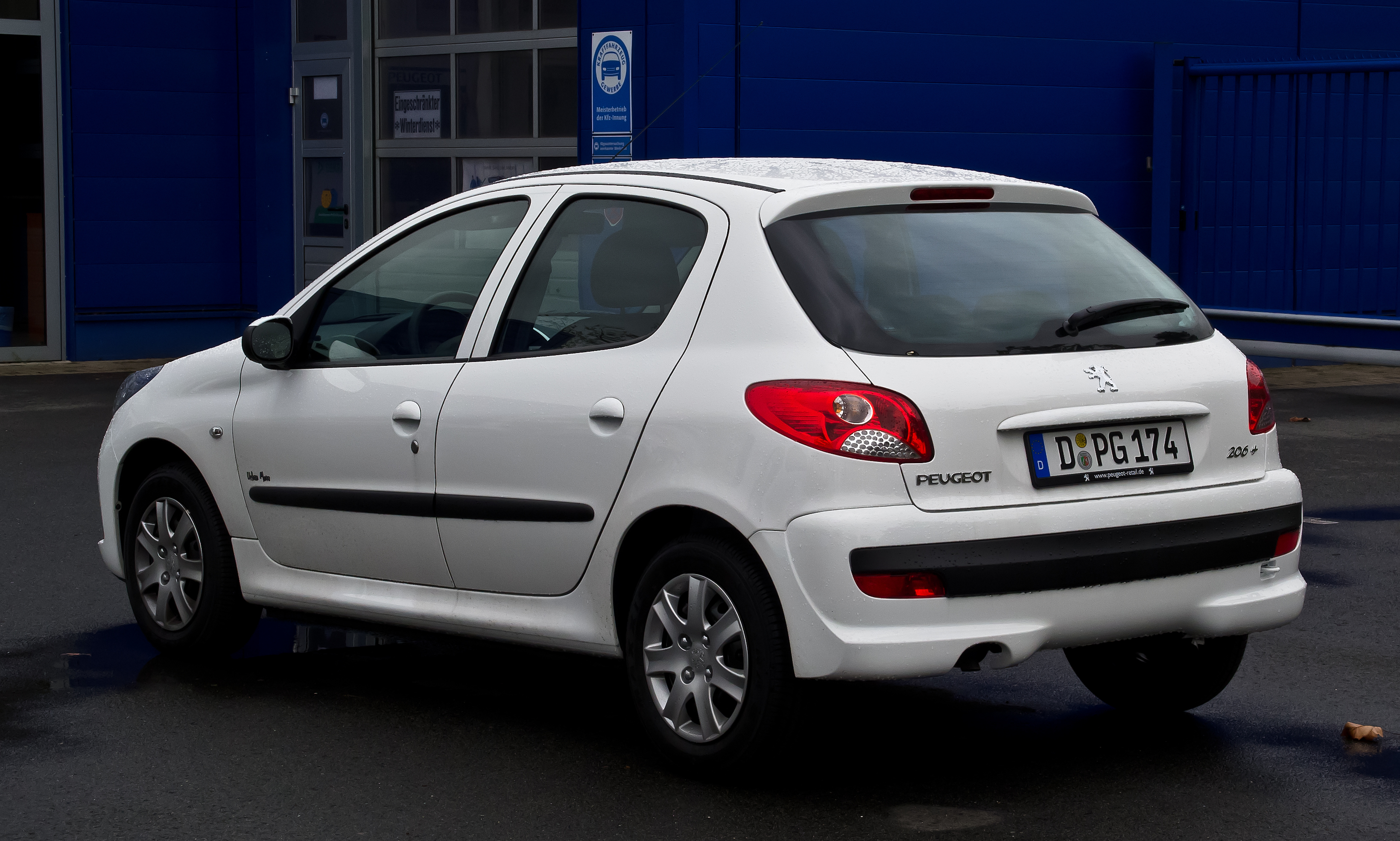 Peugeot 206+ Urban Move